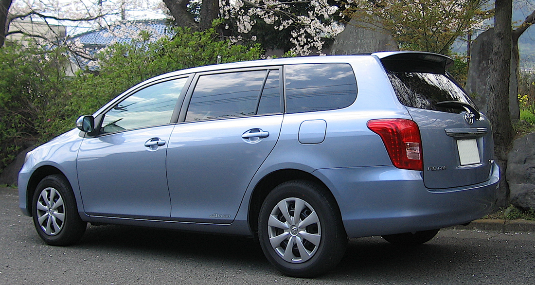 Document destiné à illustrer l'article sur la Toyota Corolla Fielder.